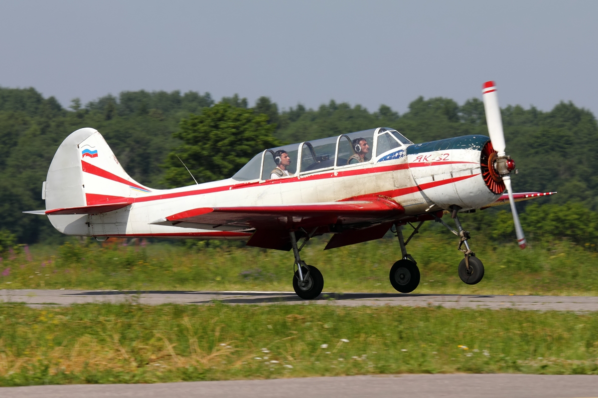 Yakovlev Yak-52